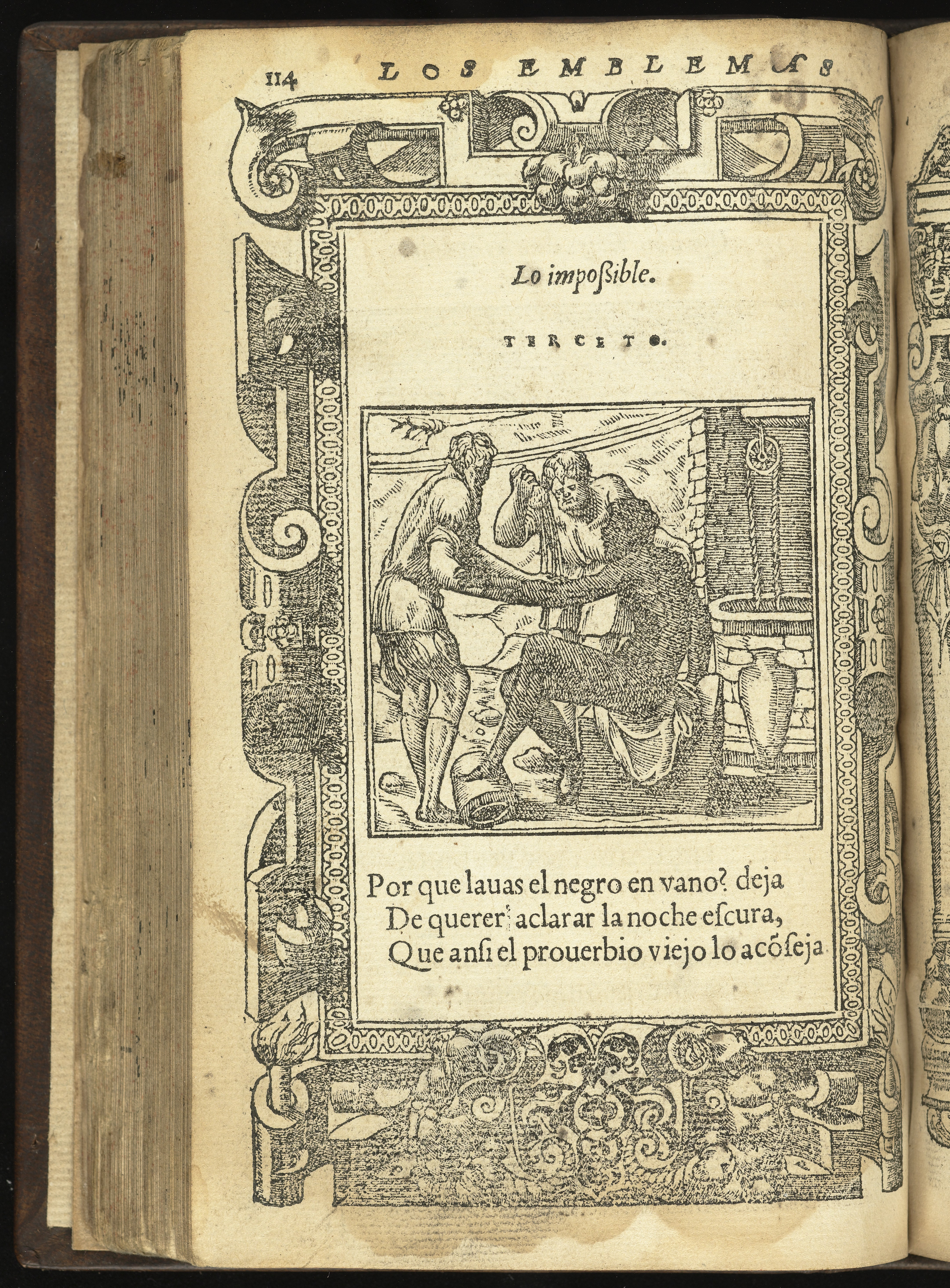 Los emblemas de Alciato. Traducidos en rhimas españolas. Añadidos de figuras y de nueuos emblemas en la tercera parte de la obra "Lo impossible" Rare Books Keywords: Emblems and Insignia